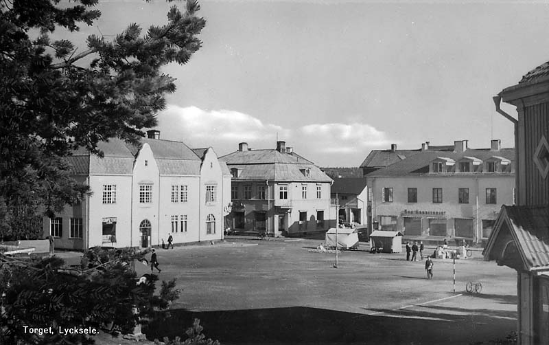 Torget.; Miljöer; Torgmiljö; Tätort